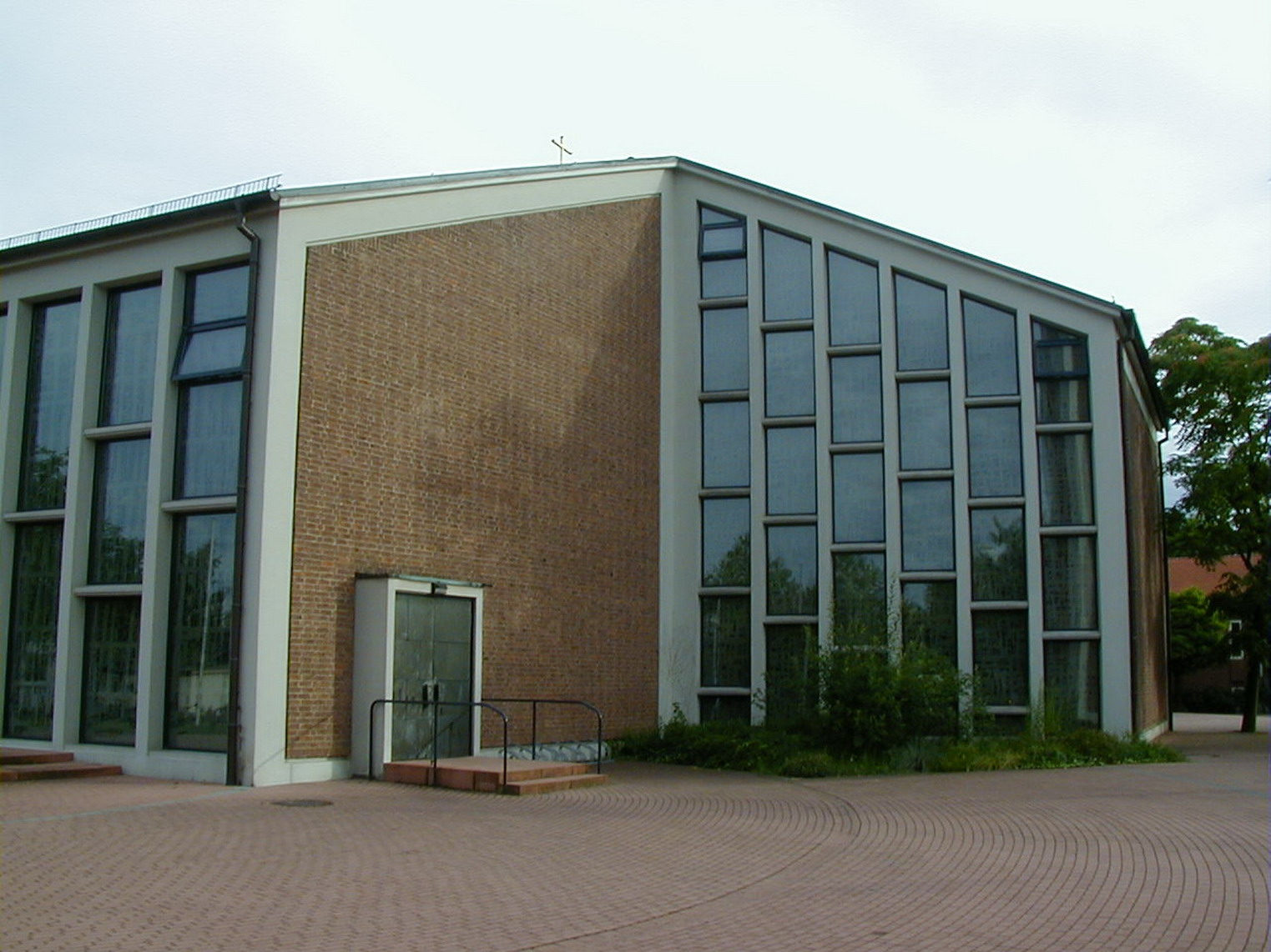 Pfarrkirche Herz Jesu Außenfassaden Orgelschiffes